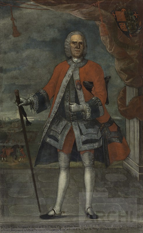 Retrato de Agustín de Salazar y Muñatones, I conde de Monteblanco (1702-1771)